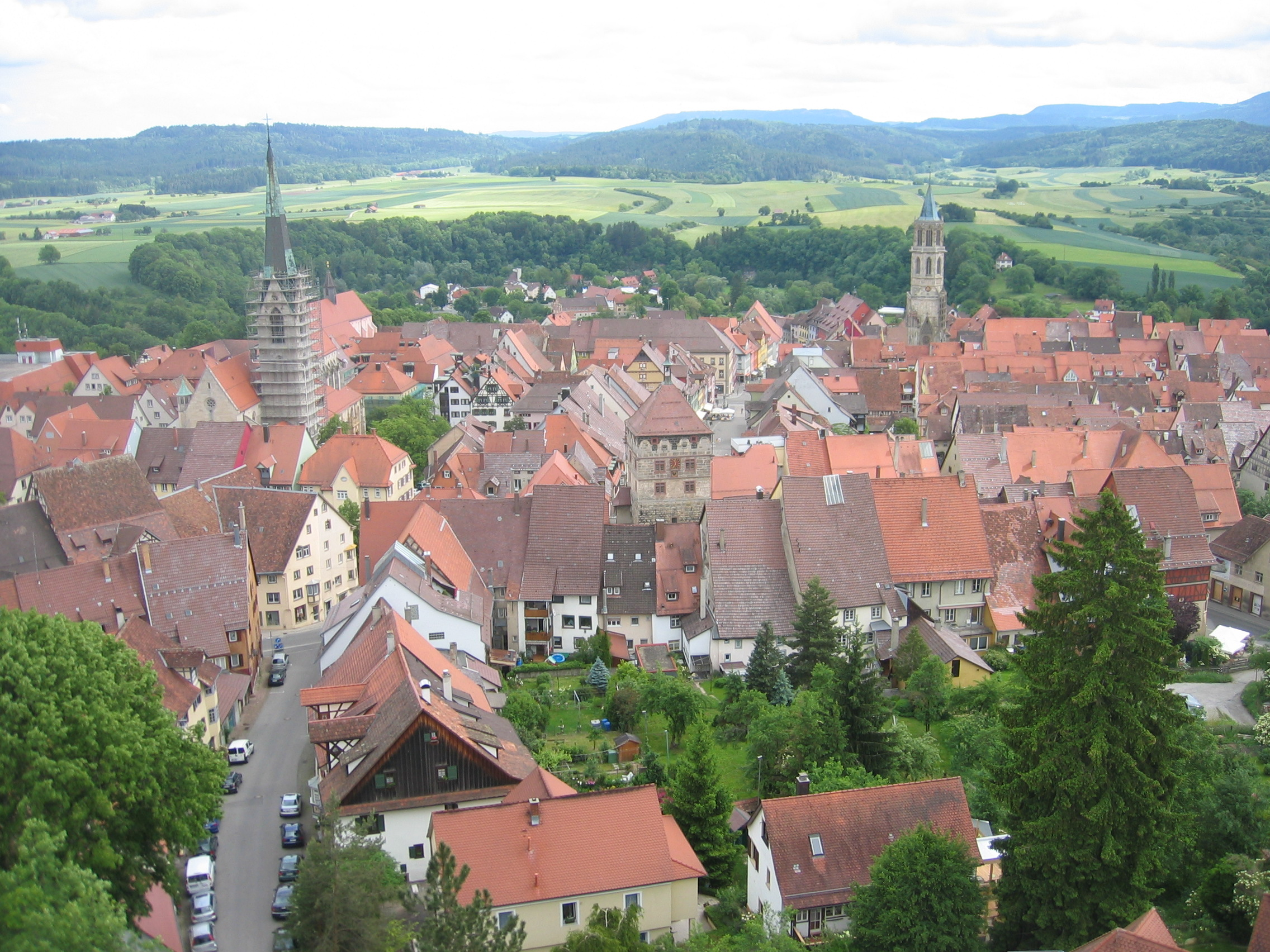 Blick auf Rottweil, Baden-Württemberg, Deutschland fotografiert vom Hochturm